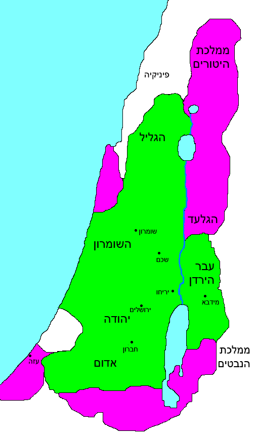 Categorie:Kaart Categorie:Afbeelding oudheid (Original text : Judea onder Alexander Janneüs)